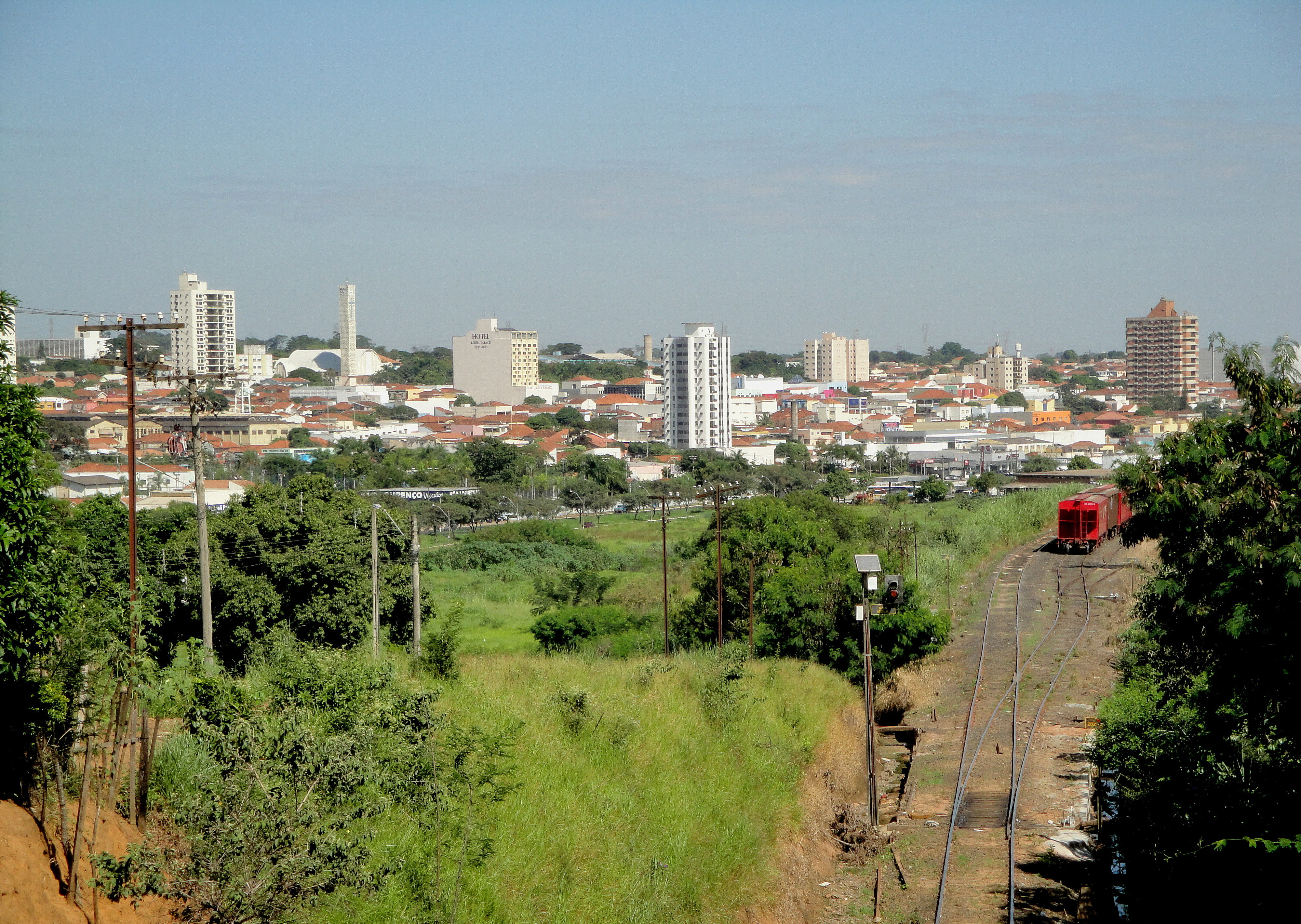 Vista do centro da cidade de Matão, SP.